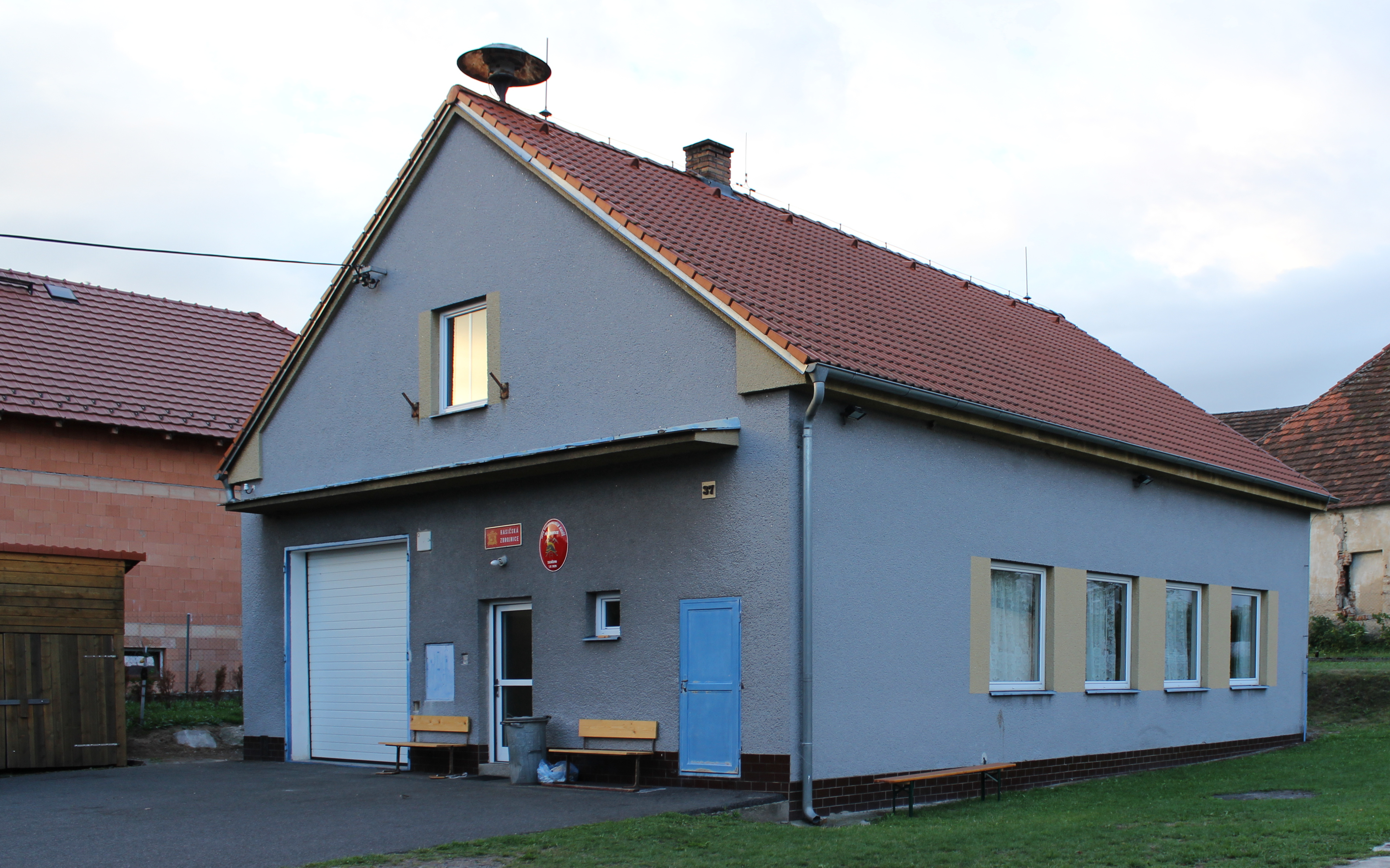 Hasičská zbrojnice v Přechovicích, okrese Strakonice.